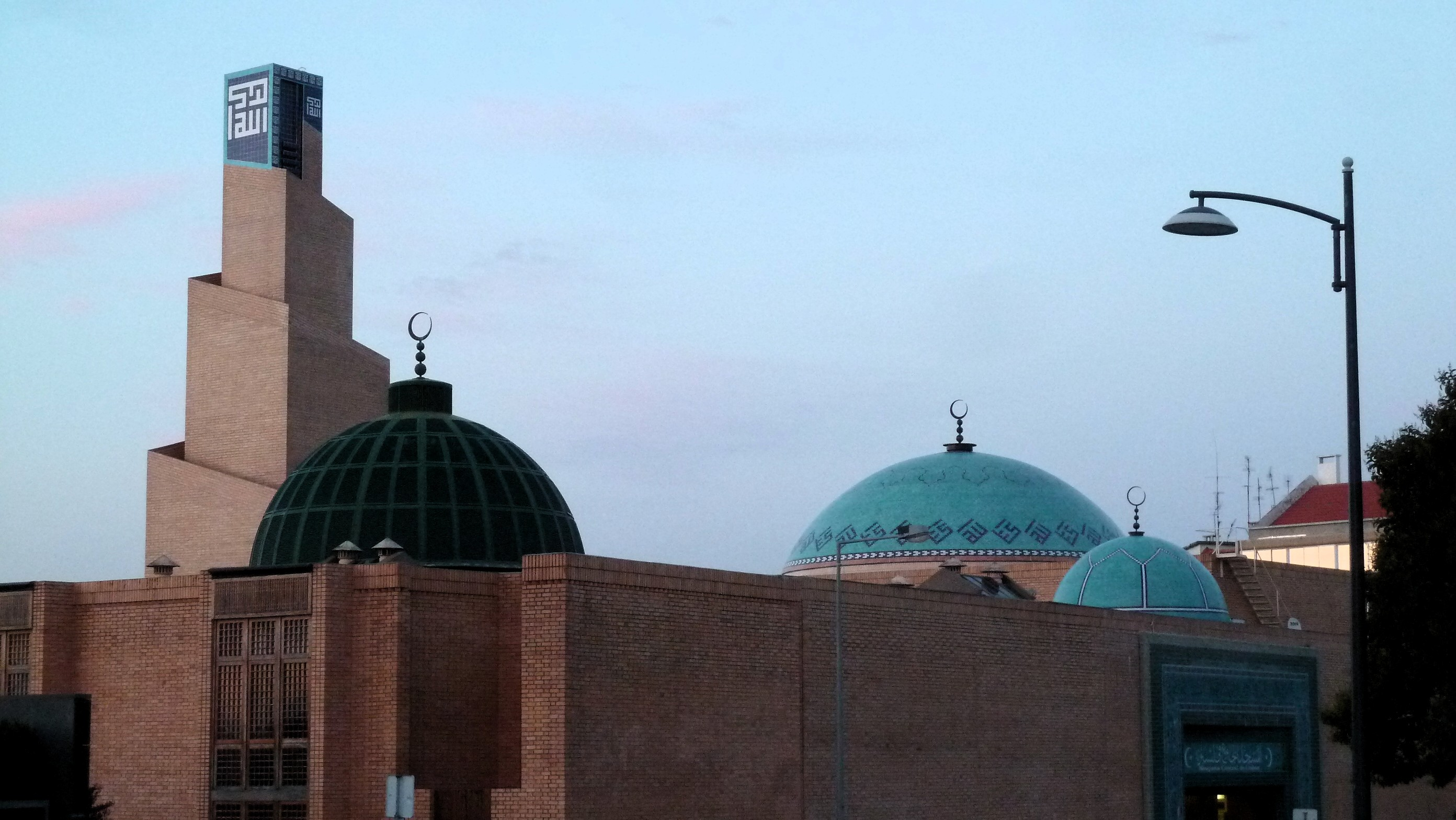 Mesquita Central de Lisboa.